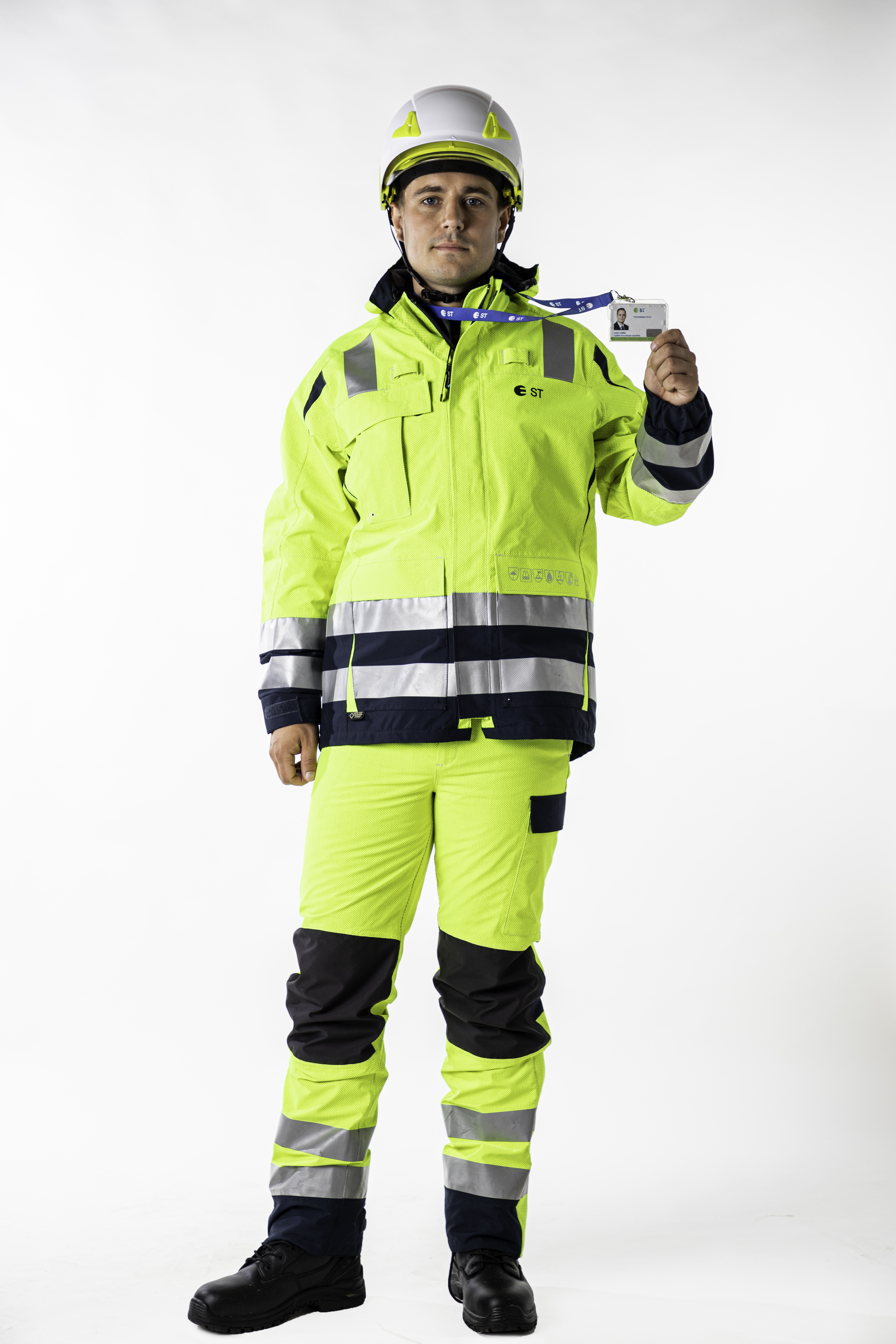 AS "Sadales tīkls" darbinieku formastērps